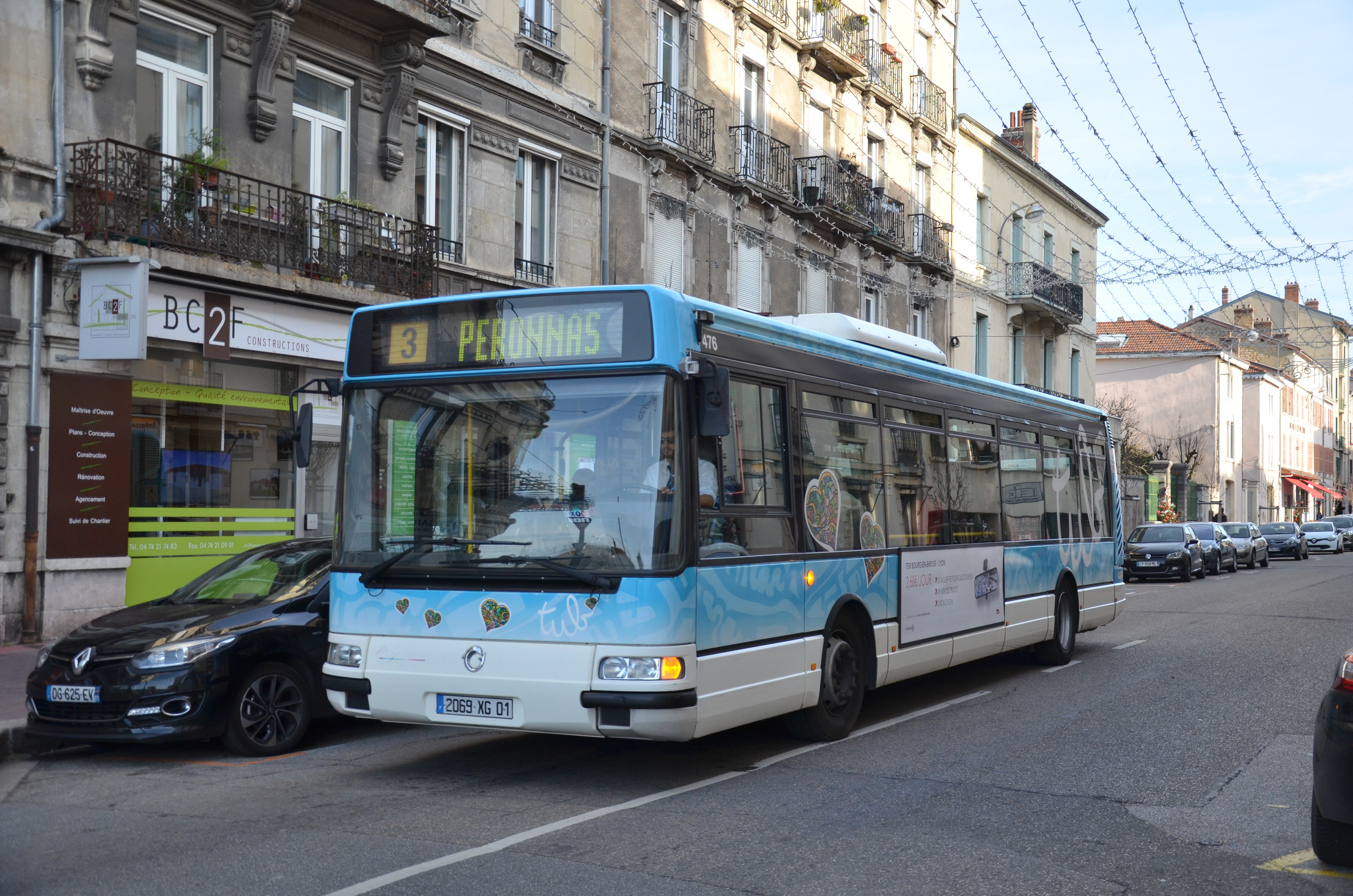 Irisbus Agora S n°476 du réseau TUB de Bourg-en-Bresse, près de l'arrêt Victoire Gare.